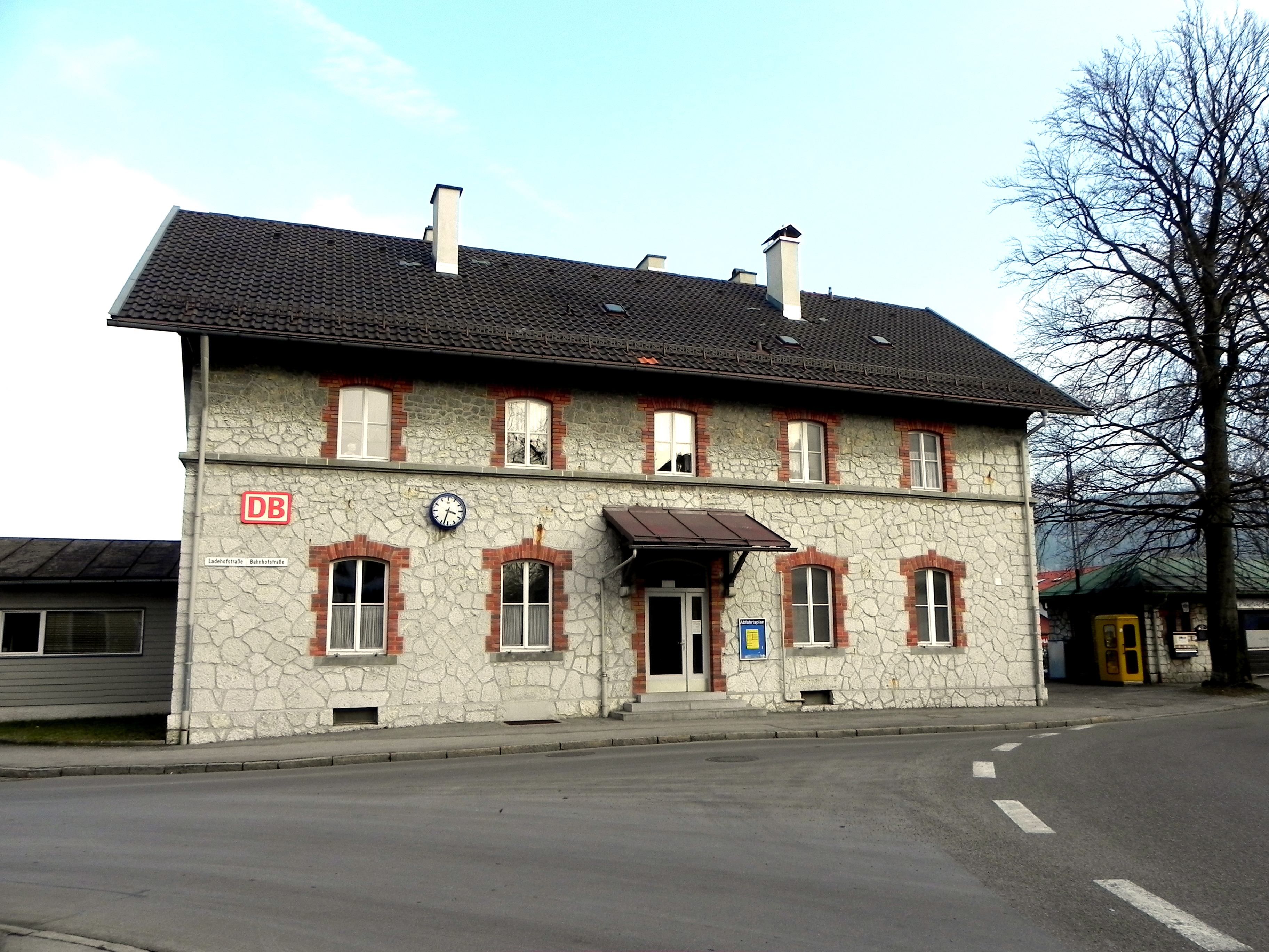 Empfangsgebäude des Bahnhofs Pfronten-Ried mit Natursteinmauerwerk